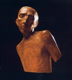 Peter Horn Werner, nació en Munich, Alemania, el 8 de abril de 1908 y falleció en Santiago de Chile, el 11 de abril de 1969. Fue un connotado escultor religioso alemán - chileno